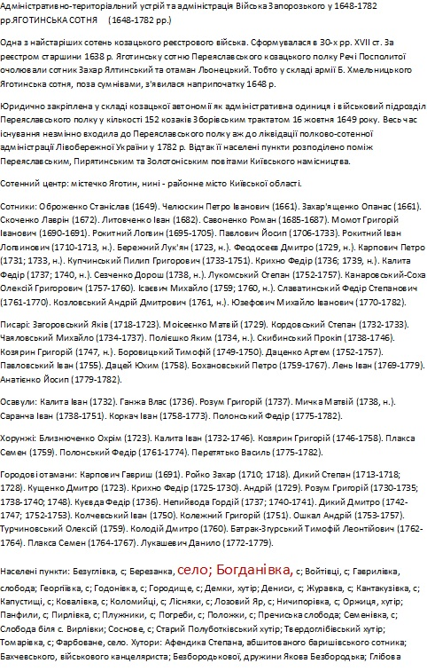 На сторінці 220-221.цього видання є перелік населених пунктів які входили до Яготинської сотні .Село Богданівка четверта в цьому списку .Першим (після Яготина) звичайно ж стоїть село Капустинці ,де розміщувались курінні цієї сотні.